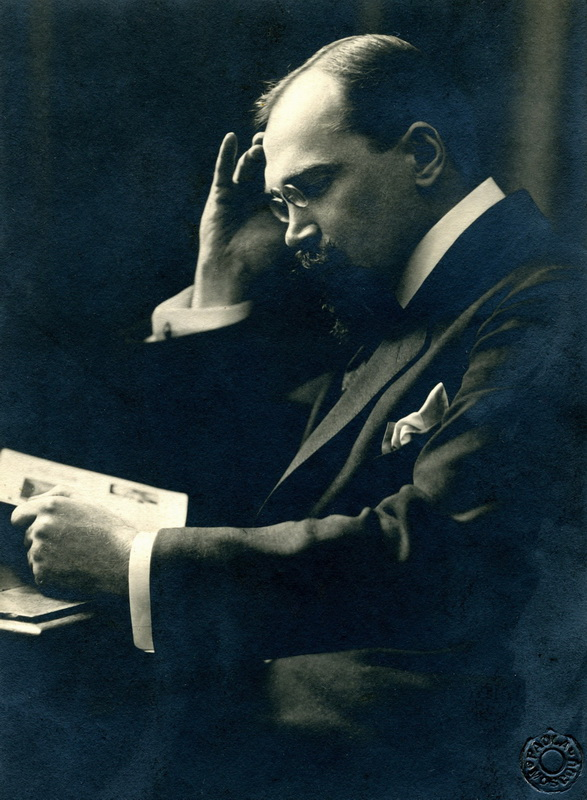 Портрет архитектора Вячеслава Константиновича Олтаржевского (скан с фотографии 1920-х годов)